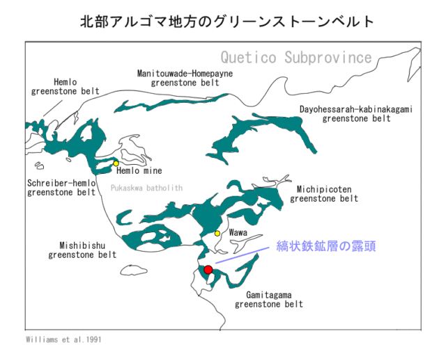 北部アルゴマ地区のグリーンストーンベルト